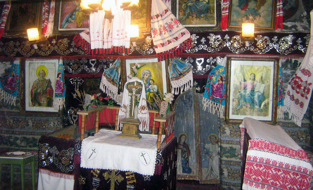 Var, Sălaj. Iconostasul. Foto: Mihai Petriş, octombrie 2007. Categorie:Biserici de lemn din Sălaj (imagini)